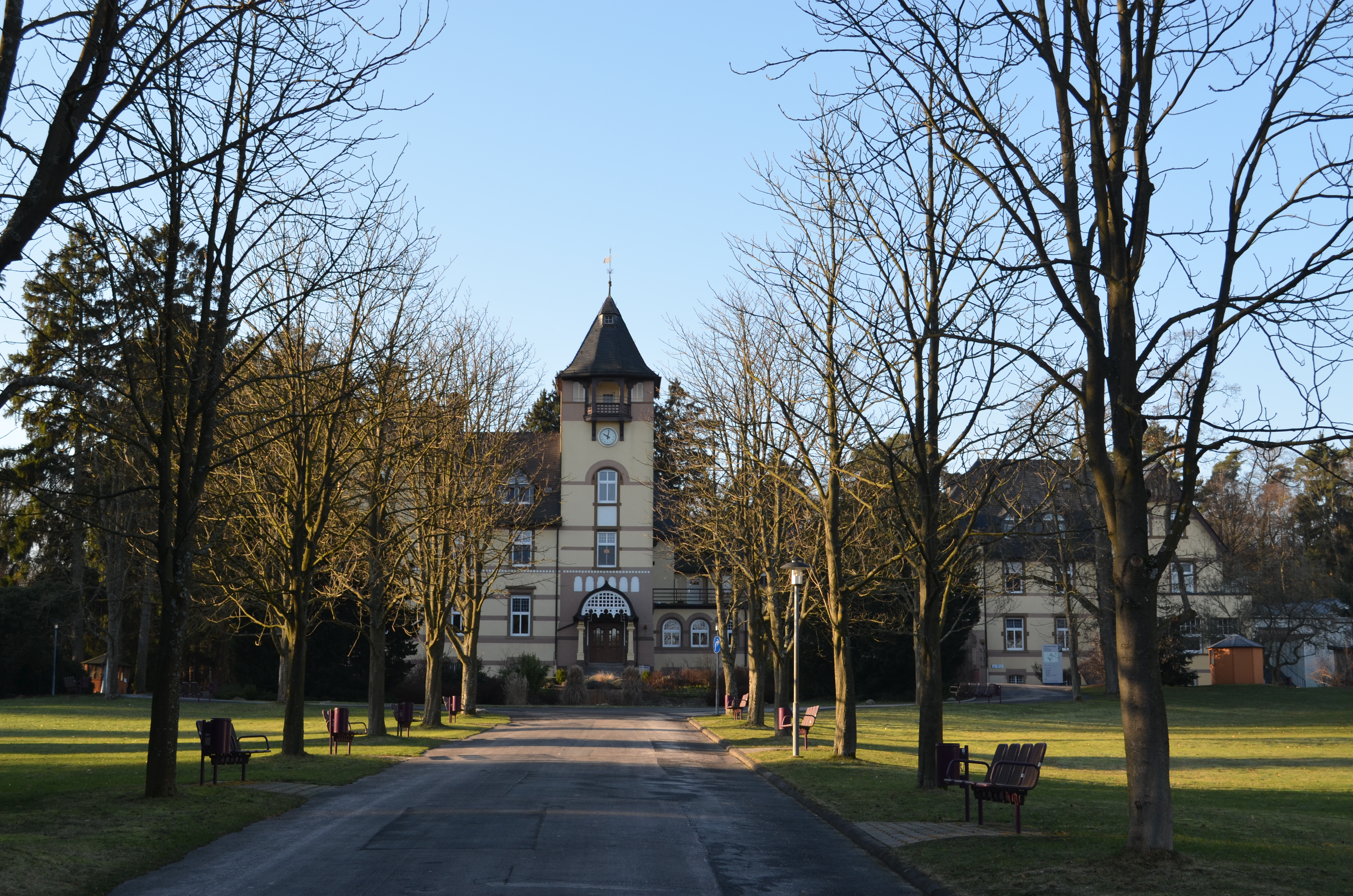 Oberursel, Klinik Hohemark, Hauptgebäude